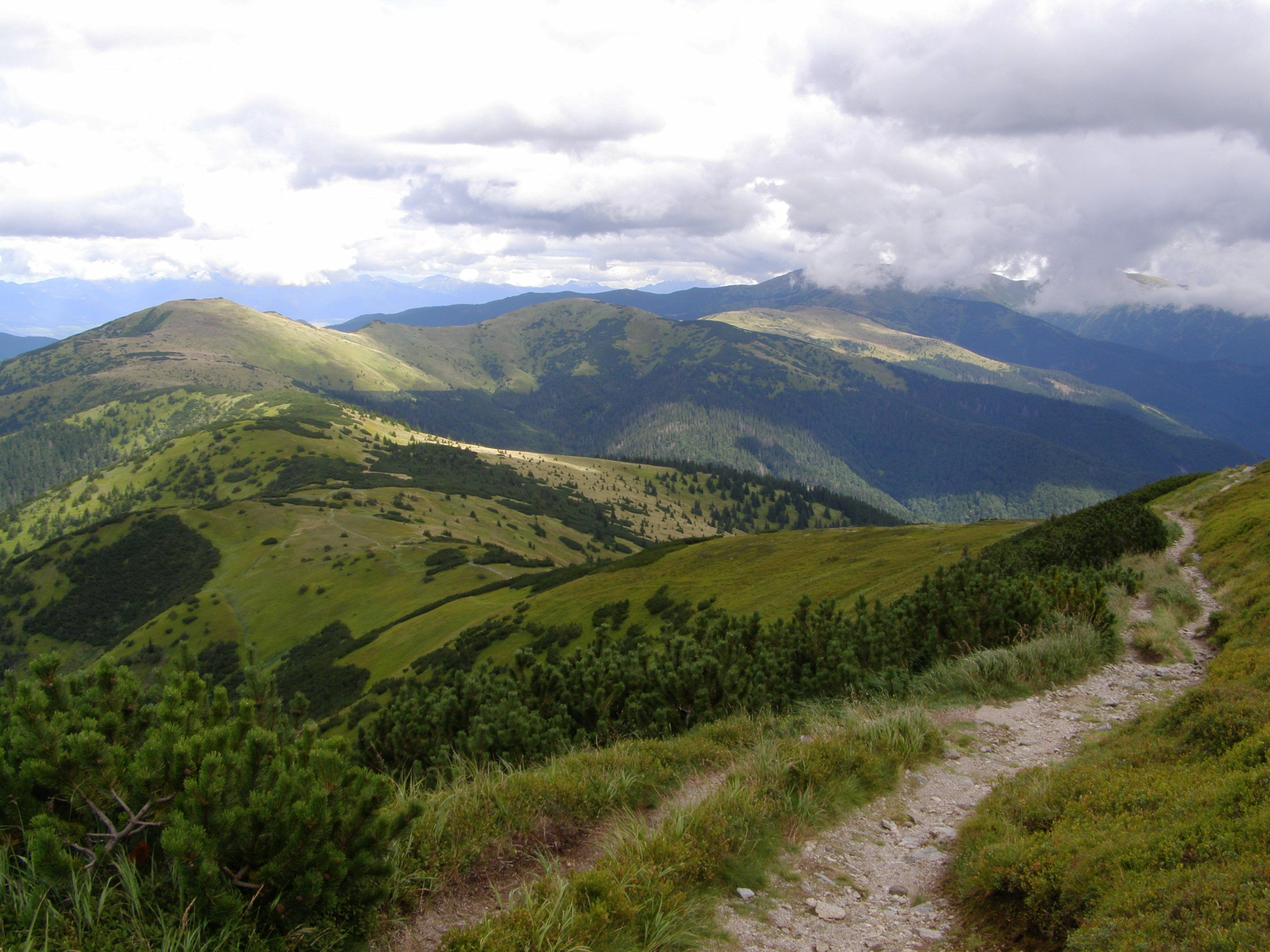 Nízké Tatry, Ďumbierské Tatry, pohled z úbočí vrcholu Košarisko (1695 m) na severovýchod: v popředí dole vrchol Skalka (1549 m), za ní osvětlená Veľká hoľa (1640), napravo od ní Latiborská hoľa (1643 m), Zámostská hoľa (1612 m), v mracích Ďurková (1750 m)